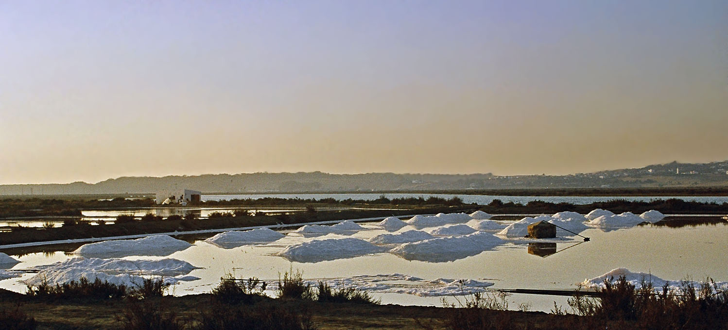 Larache, Morocco, Saline...